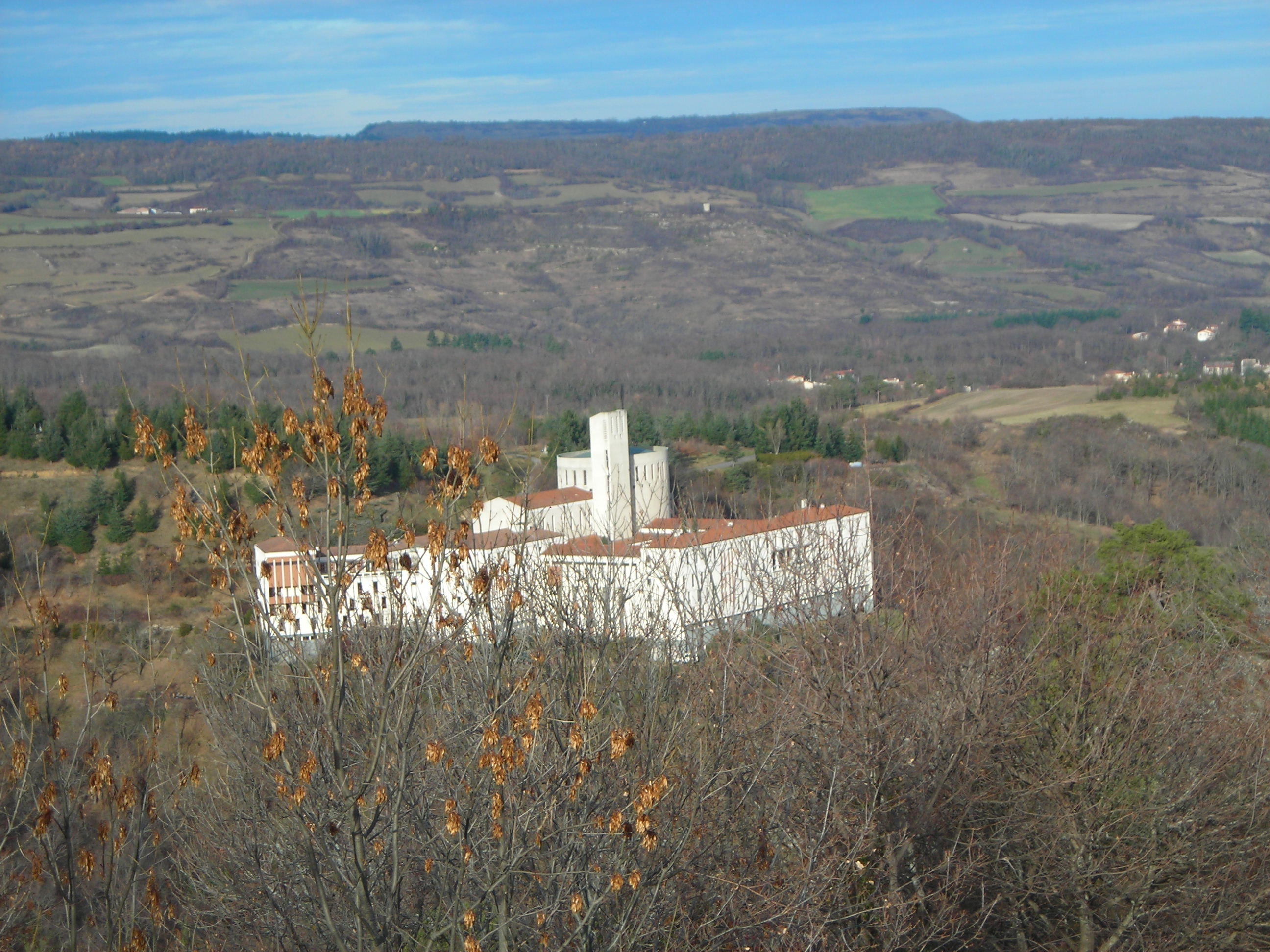 Vue de l'abbaye de Randol à partir de l'oppidum gaulois